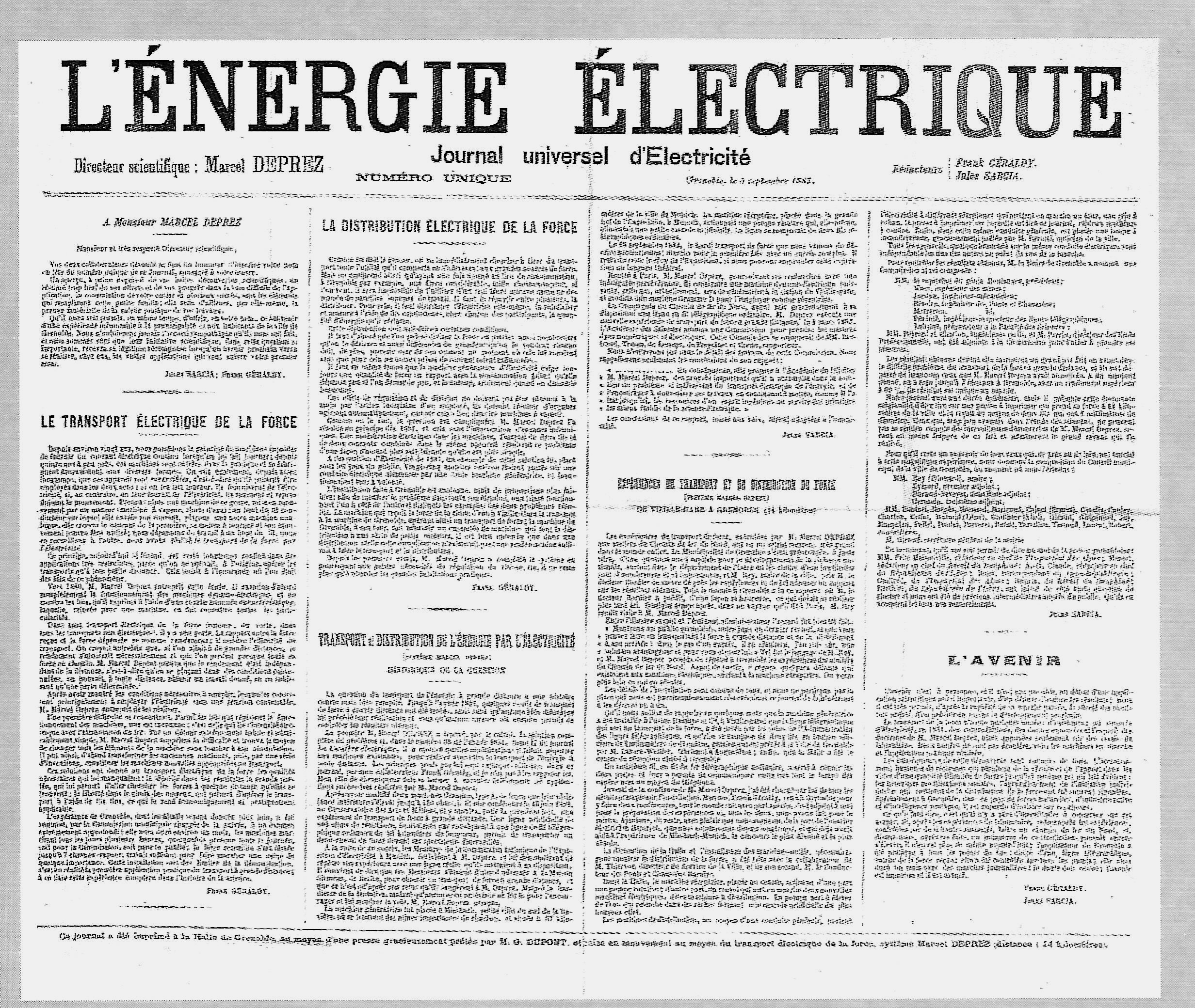 Journal unique imprimé lors du transport d'électricité de Marcel Deprez de Vizille à Grenoble le 22 août 1883